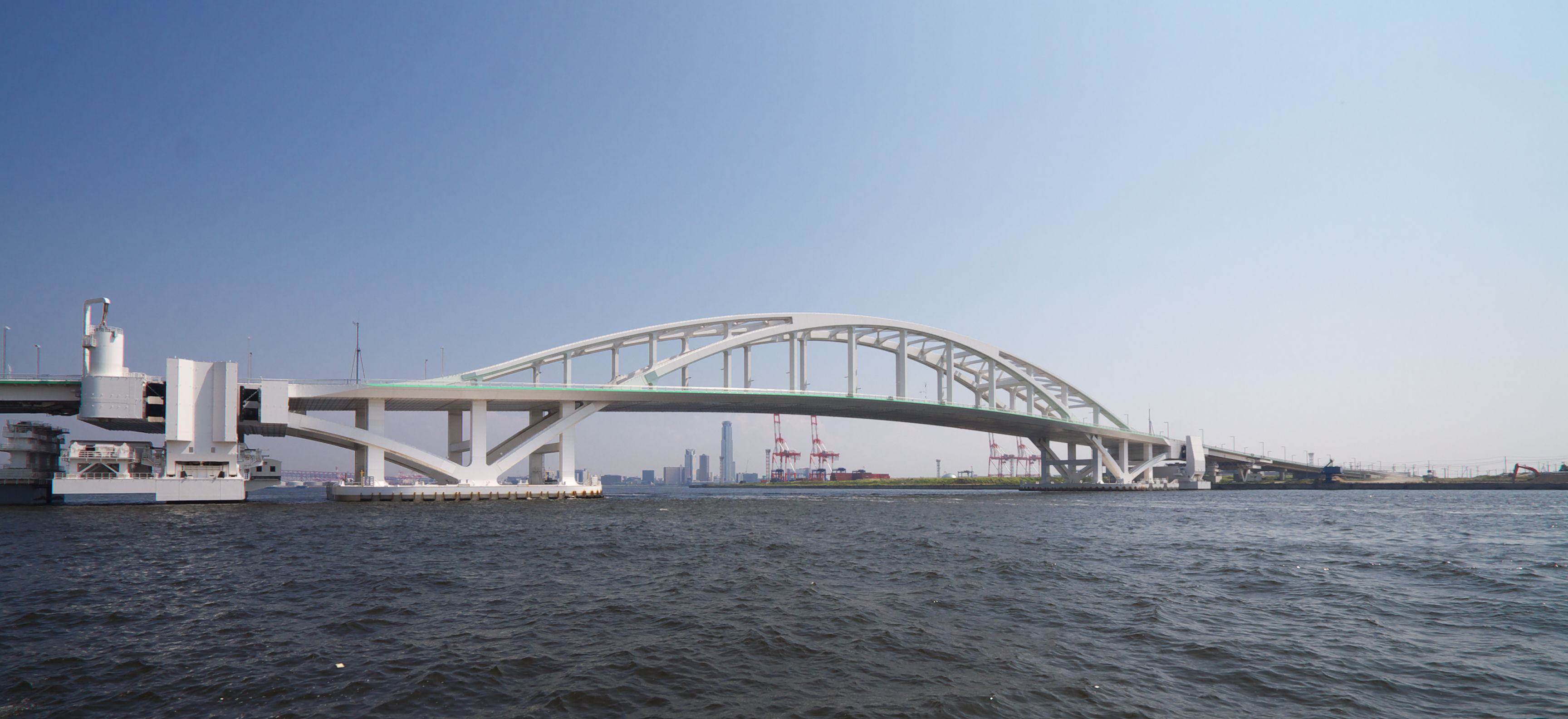 Yumemai Ohashi (Osaka, Japan)/ 夢舞大橋(大阪市, 日本)